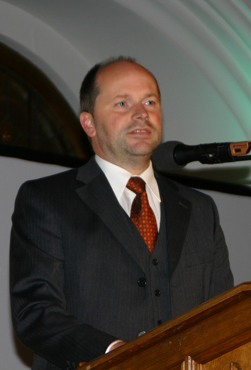 Michael Beleites, Landwirt, Mitbegründer der Umweltbewegung in der DDR, ehem. Sächsischer Landesbeauftragter für die Stasi-Unterlagen, geb. am 30. September 1964 in Halle (Saale). Hier bei der Veranstaltung zur Preisverleihung des Nuclear-Free Future Awards in München am 24.10.2008.